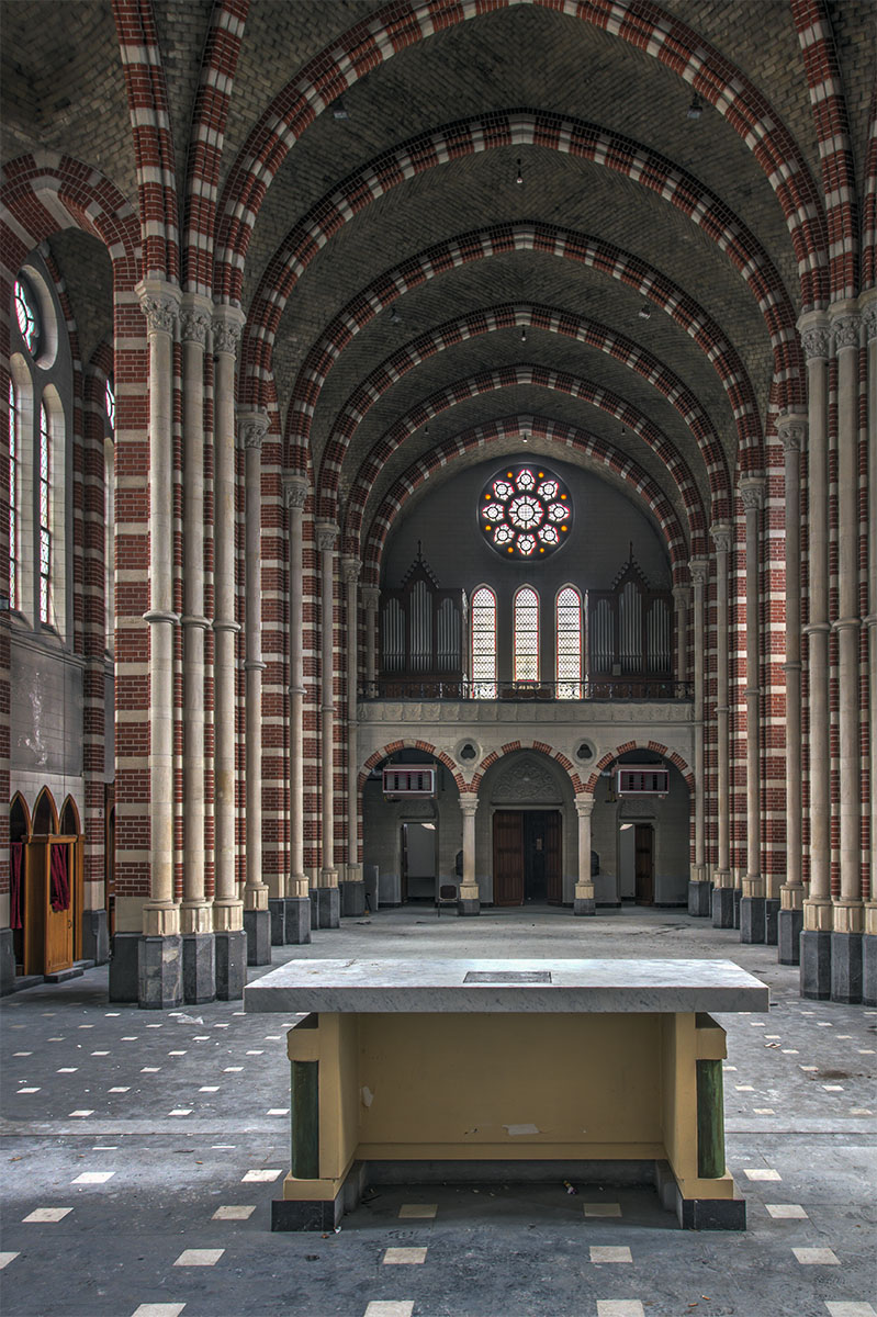 Overzicht kerk klooster Gerkensberg vanaf het altaar met zicht op het tabernakel en orgelpijpen.